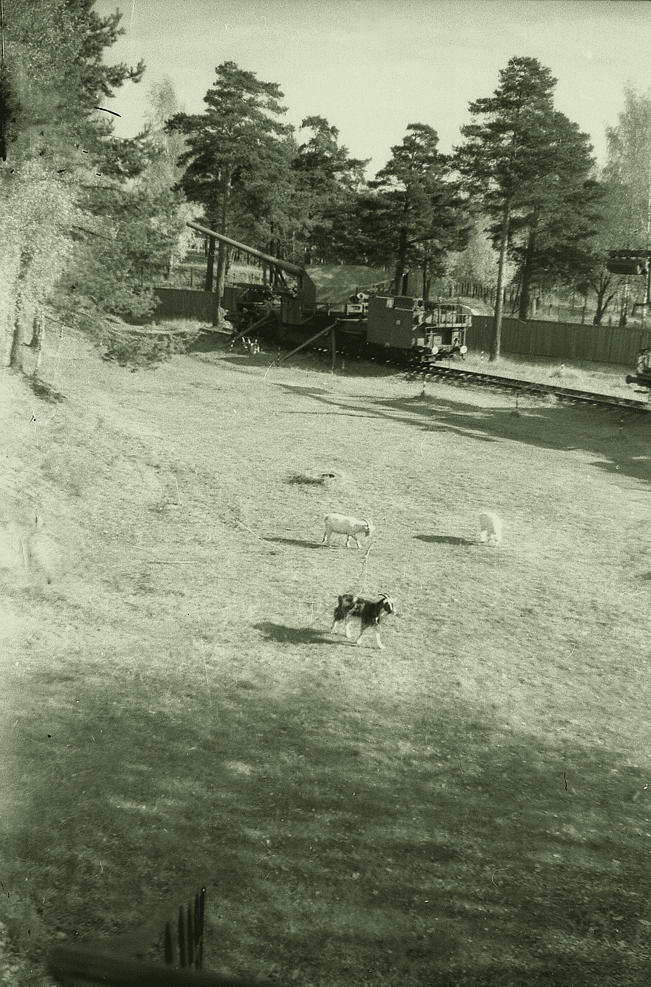 Общий вид форта Красная Горка